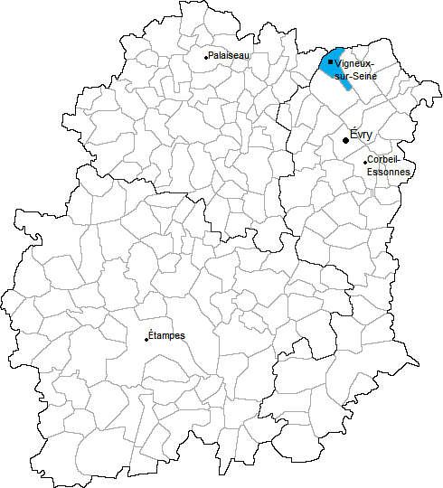 Carte de localisation du canton de Vigneux-sur-Seine en Essonne (91)